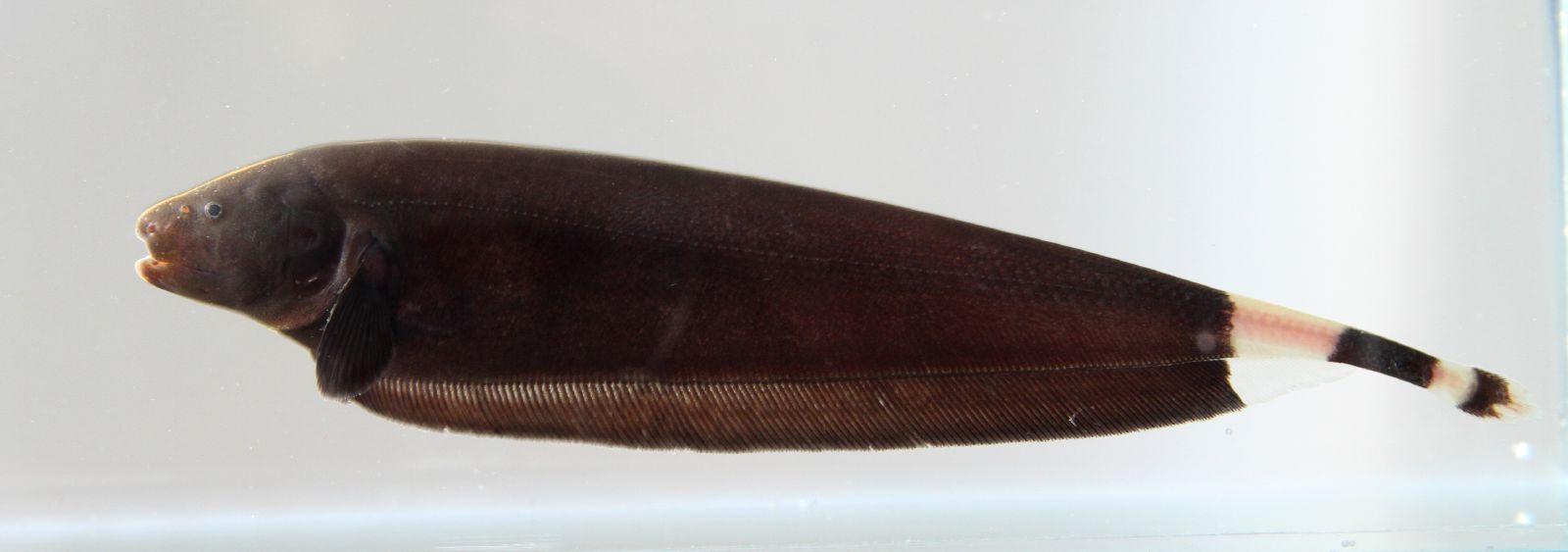 Weißstirn-Messerfisch (Apteronotus albifrons)